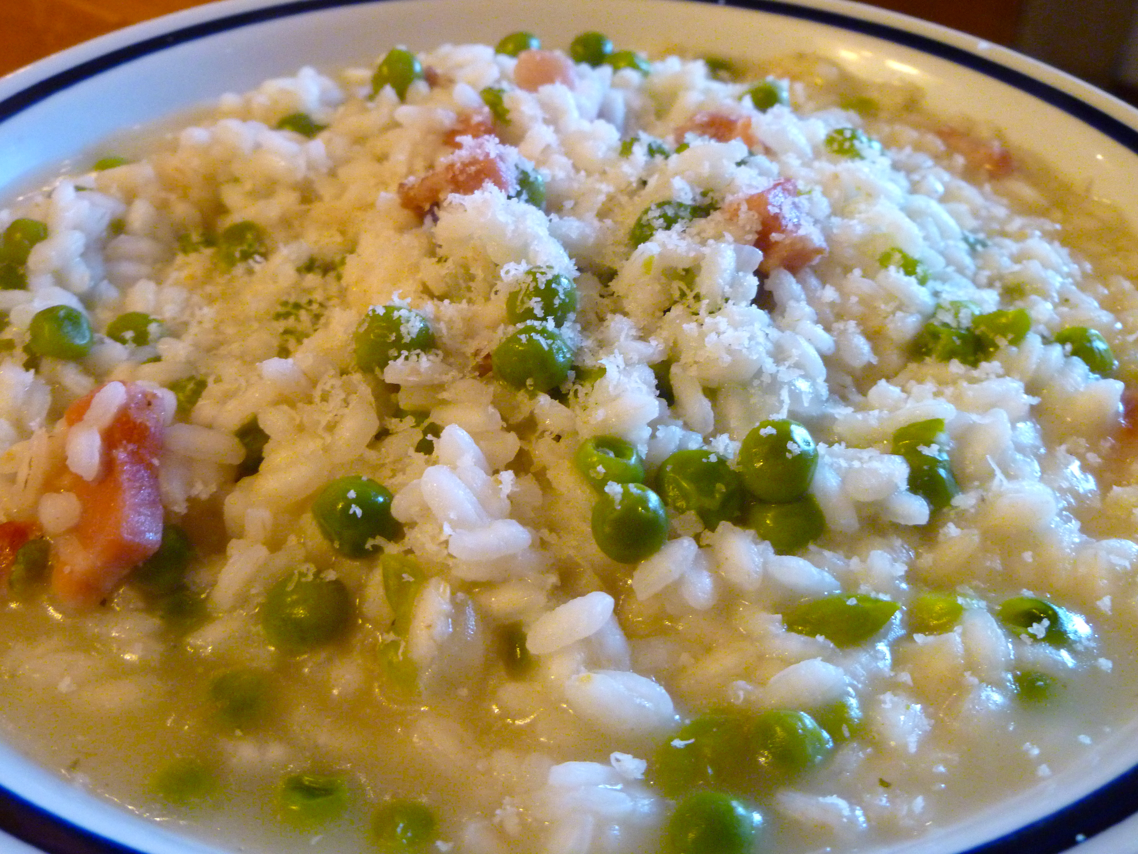 Un piatto di risi e bisi